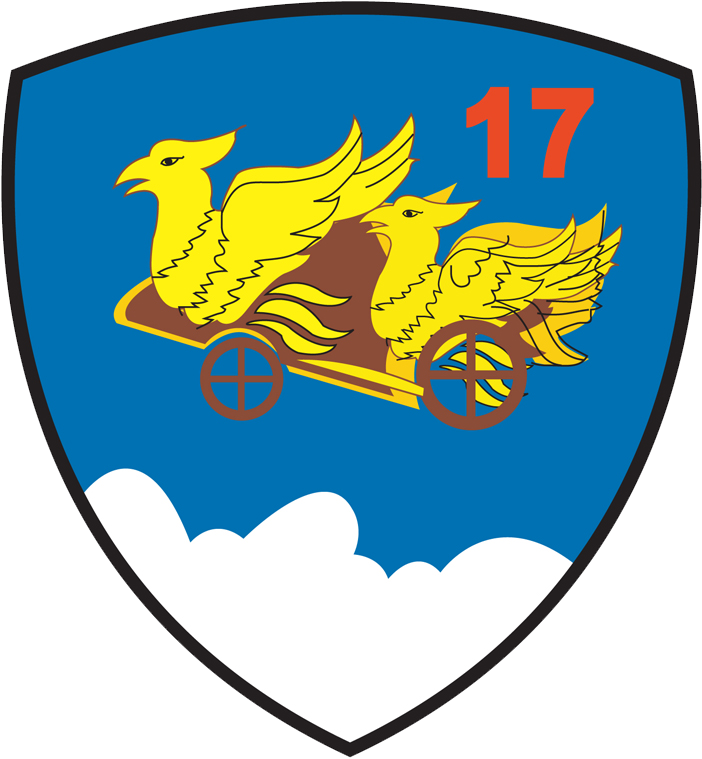 Gambar ini adalah Lambang Skuadron Udara 17, Koops AU I